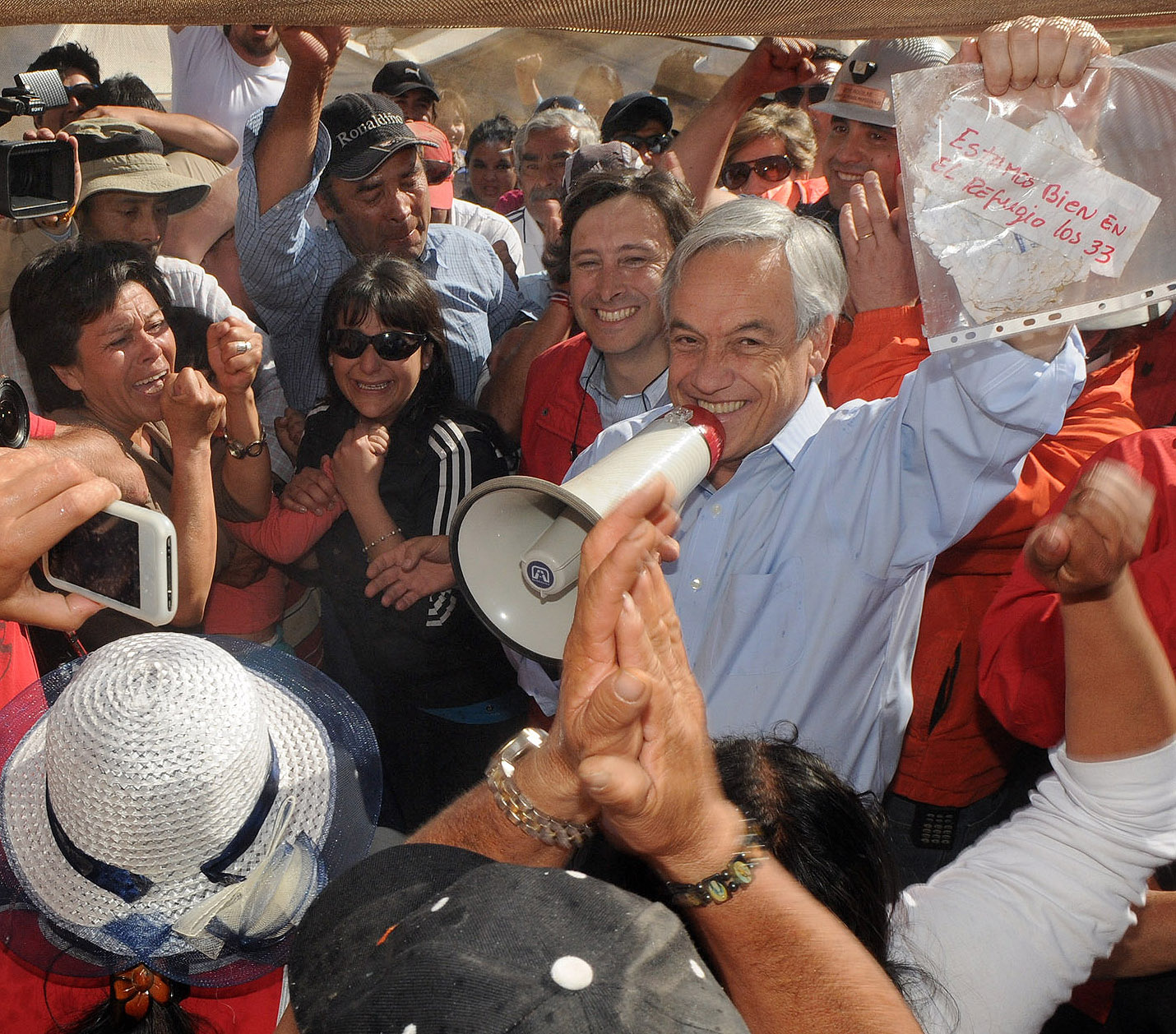 El Presidente de la República realizó una visita a la mina San José, donde comunicó al país que los 33 mineros se encontraban con vida.